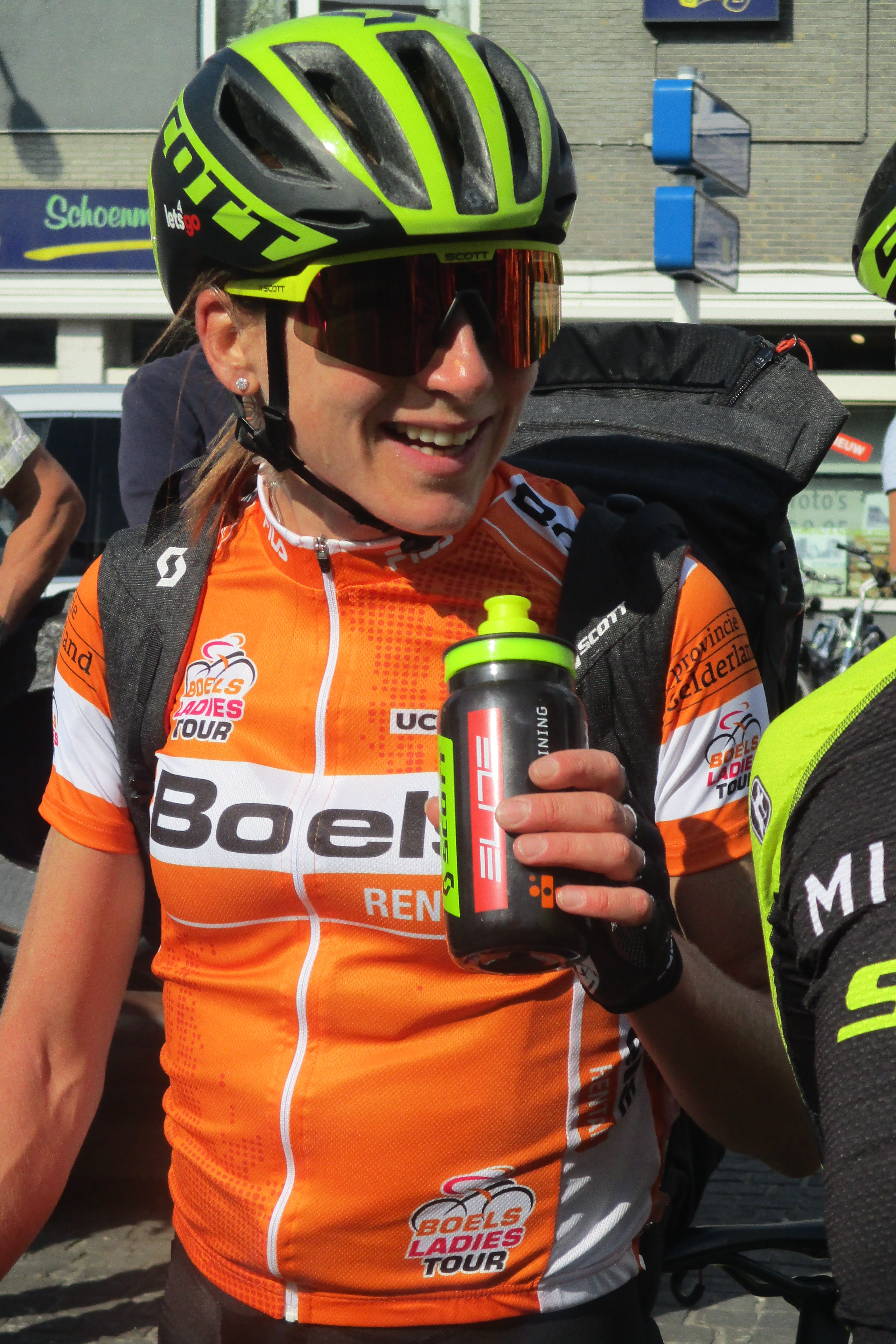 4e etappe van de Boels Ladies Tour 2018 door Noord-Limburg, finish in Weert.